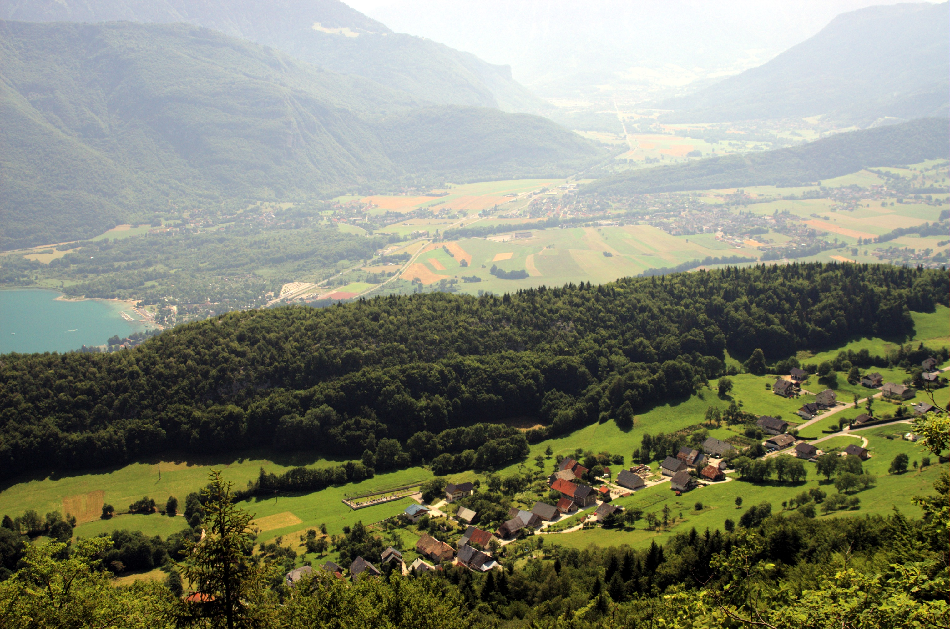 La commune d'Entrevernes vue des hauteurs du col de la Cochette. Par dessus le Taillefer, on distingue au loin la commune de Doussard à droite, avec son hameau Verthier à gauche, situé à la rive sud du lac d'Annecy. Au loin, la route nationale disparaît vers Faverges.